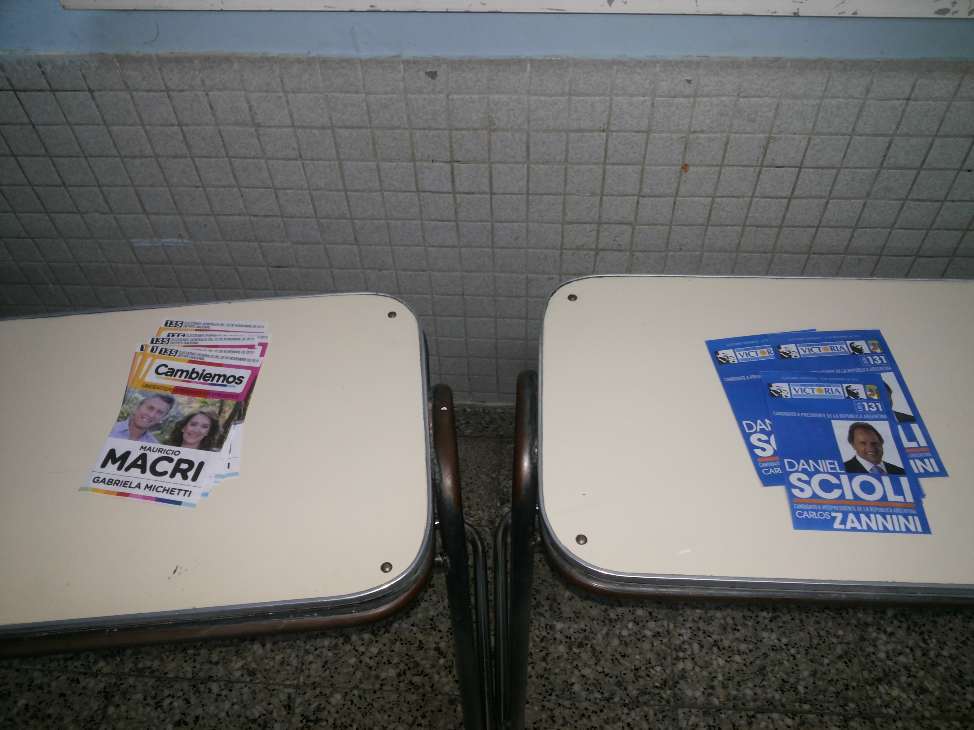 Balotaje (segunda vuelta electoral) de Argentina del 22 de noviembre de 2015 en Trelew, provincia de Chubut